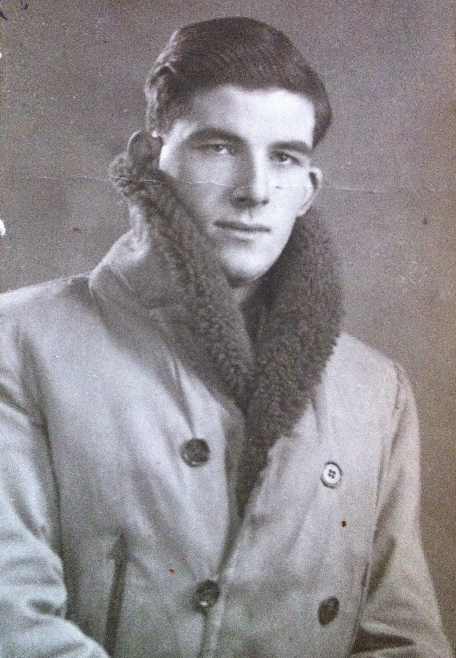 Alain de Prelle de la Nieppe (1922-1955), écuyer, journaliste, écrivain, globe-trotter, correspondant de guerre à l'ONU en Corée, tué en mission de reportage de guerre au Maroc.